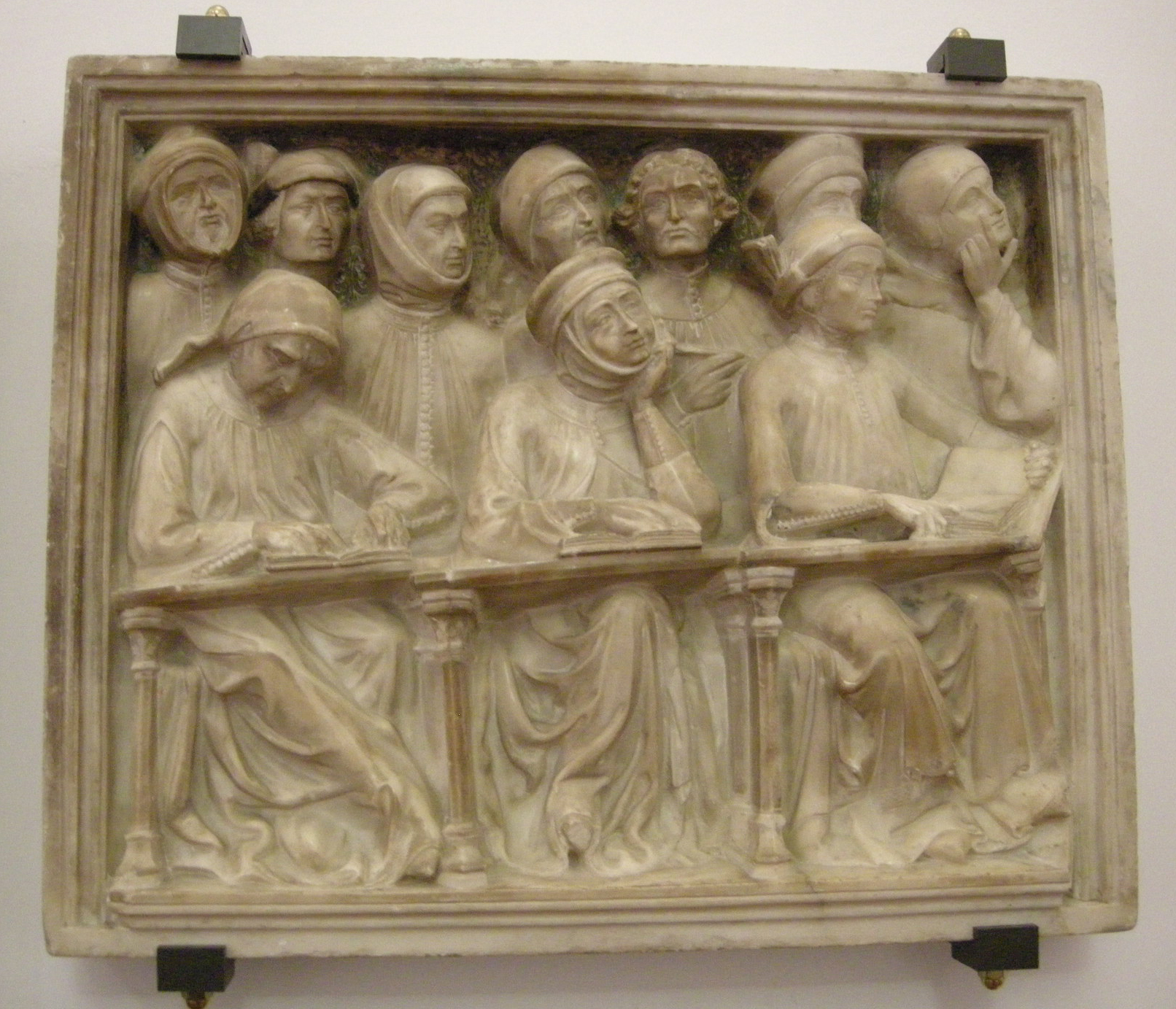 Studenti universitari. Dettaglio da: Pier Paolo delle Masegne e Jacobello da Bologna, Frammenti dell'arca di Giovanni da Legnano (morto nel 1383), esposta nel Museo civico medievale a Bologna.